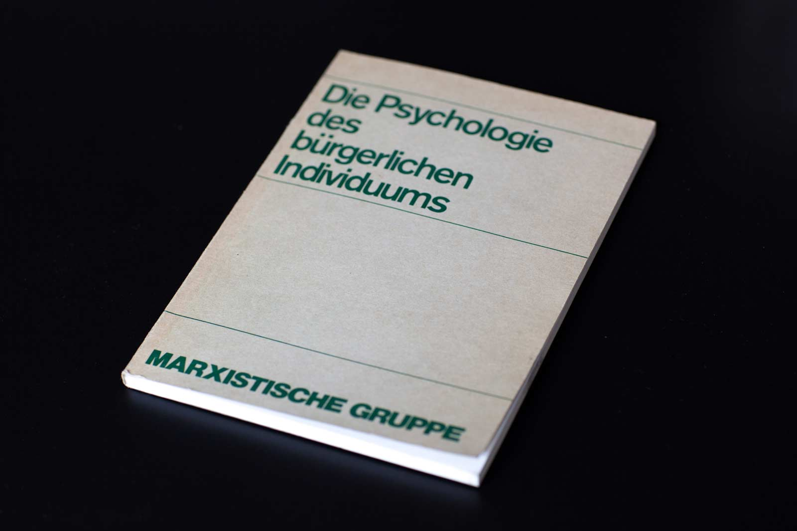 Publikation der Marxistischen Gruppe (MG) zum freien Willen und der Psychologie aus marxistischer Sicht